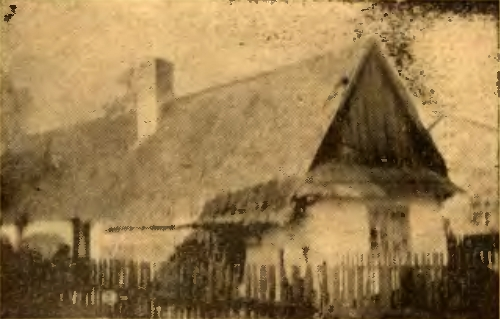 Altes Wohnhaus in Friedrichsgrätz.